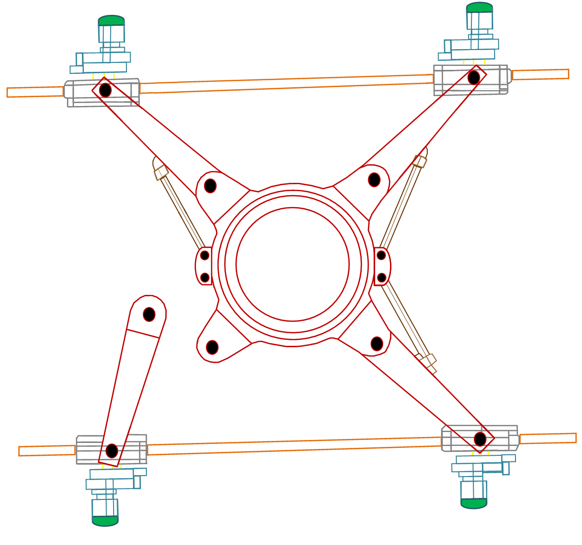 сборка ходовой рамы - часть 1